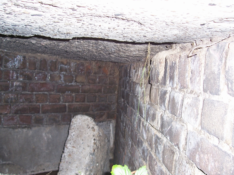 Opslagplaats A42, bunkercomplex Katwijk.